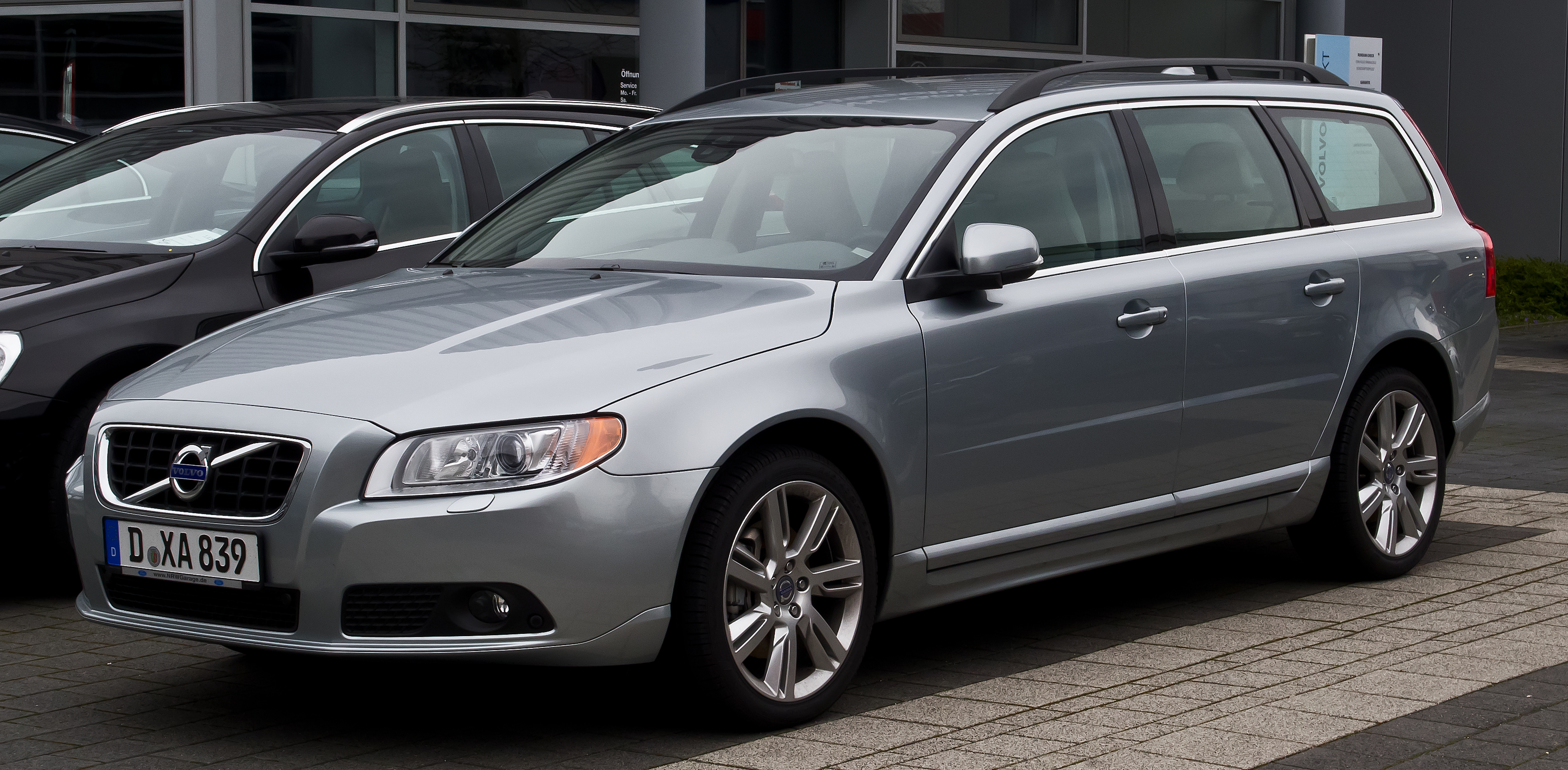 Volvo V70 D5 (III)